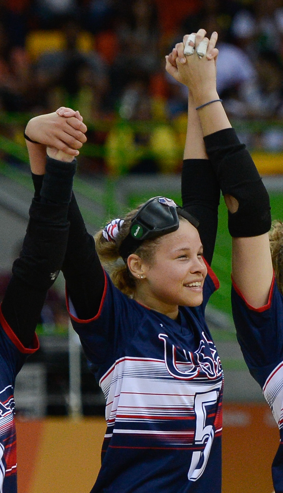 5=Amanda Dennis at Rio de Janeiro - Brasil perde para os Estados Unidos no golbol feminino e termina em quarto lugar nos Jogos Paralímpicos Rio 2016 (Fernando Frazão/Agência Brasil)